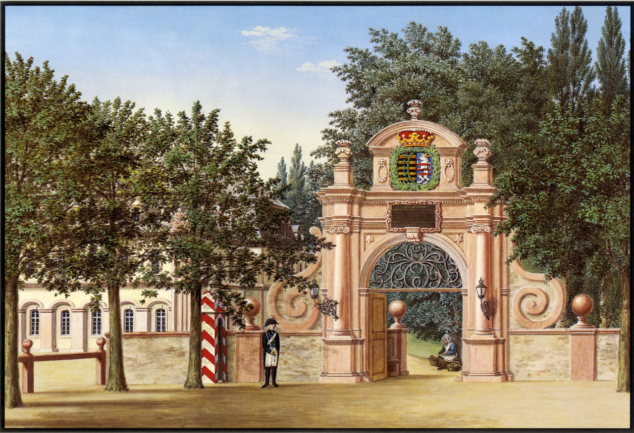 Ansicht des Haupteingangs in das Großherzogliche Bosquet um 1846